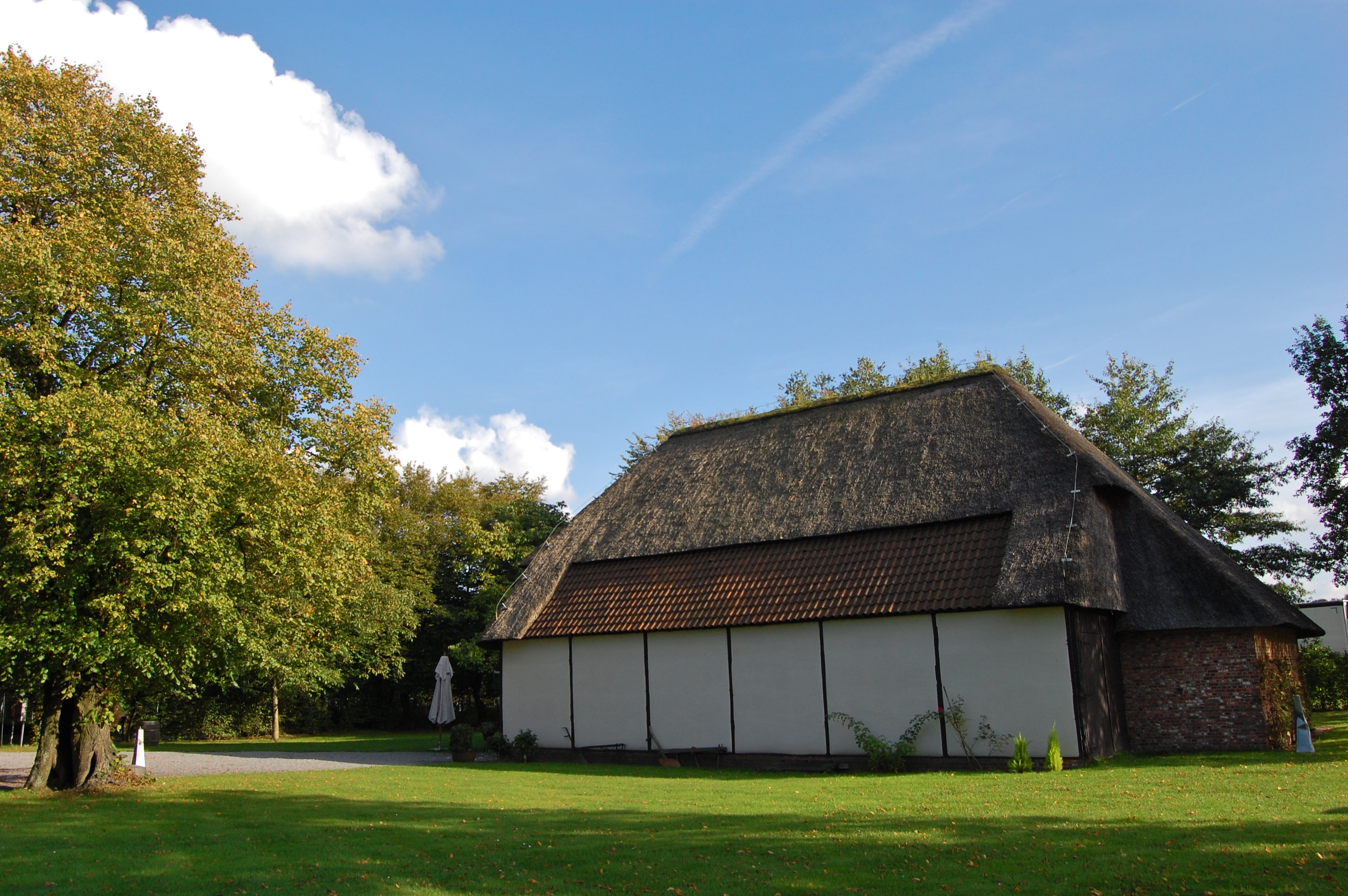 De feestzaal van de Grote Hoef, gelegen langs de ring rond Lommel.